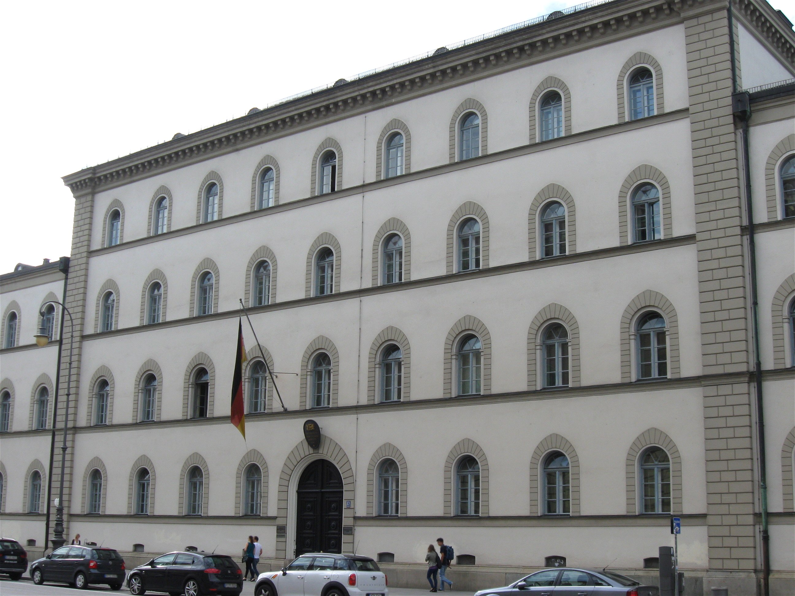 Ludwigstraße 23; Ehem. Damenstift, jetzt Bayerischer Verwaltungsgerichtshof langgestreckter dreigeschossiger Putzbau mit erhöhten Mittel- und Seitenpavillons, im nüchternen Rundbogenstil, von Friedrich von Gärtner, 1835–39, Wiederherstellung nach Kriegsbeschädigung durch das Landbauamt München, 1953; ehem. Wohnhaus, jetzt Bürogebäude, nördlich im Hof freistehender, dreigeschossiger, kubischer Walmdachbau, klassizistisch, erbaut von Franz Gießl, 1823/24.